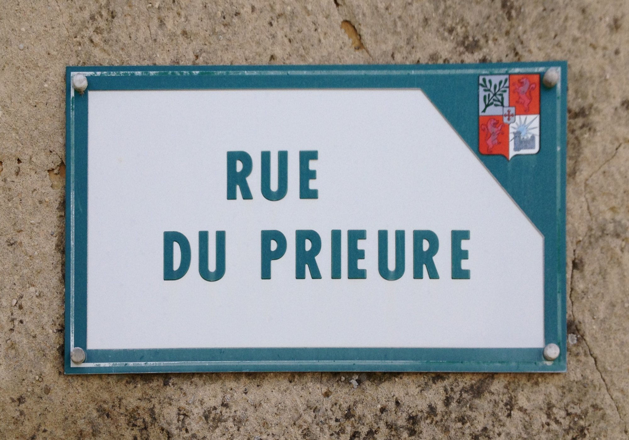 Rue du prieuré (Beynost).